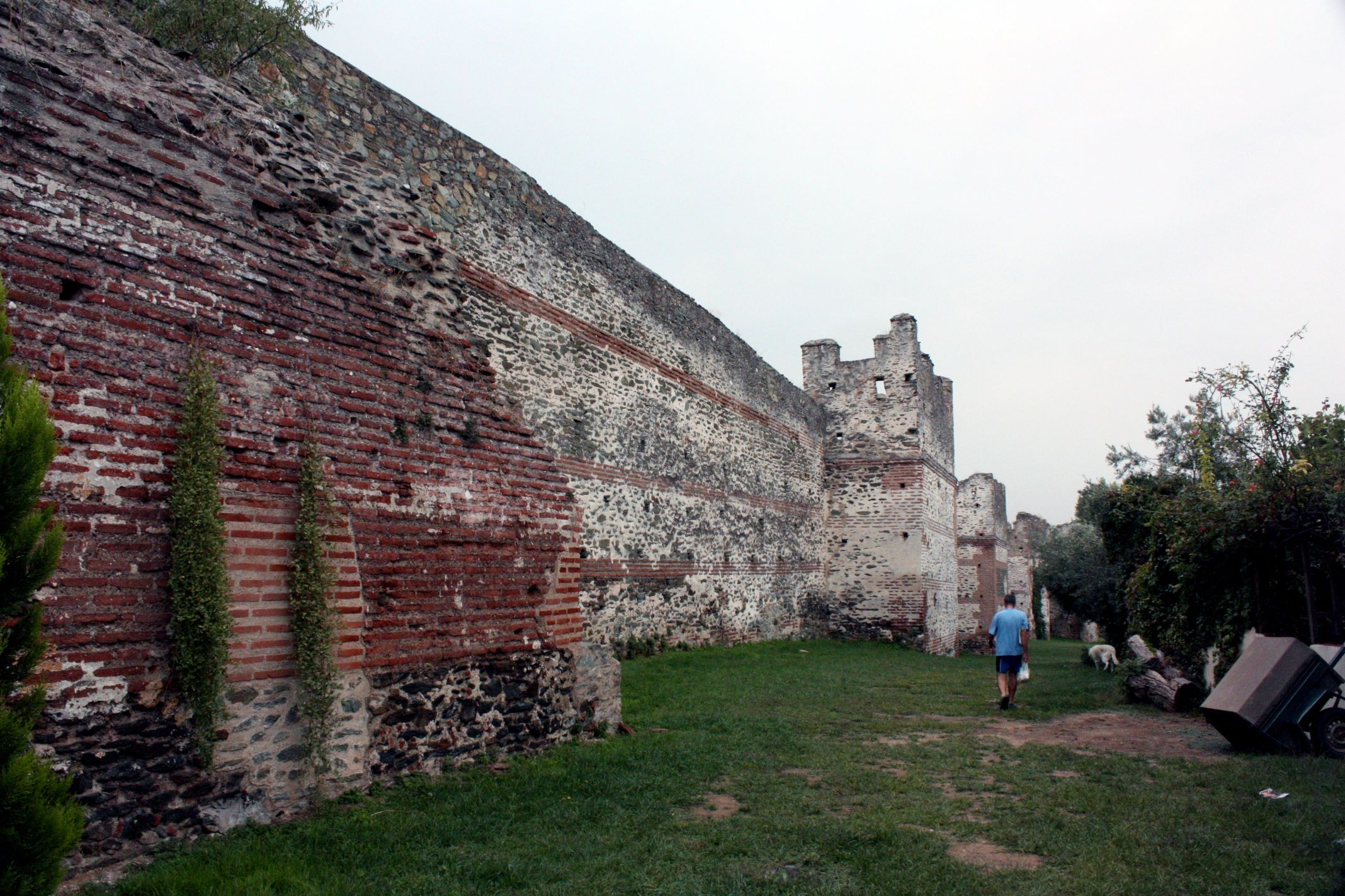 Die alte Stadtmauer von Thessaloniki